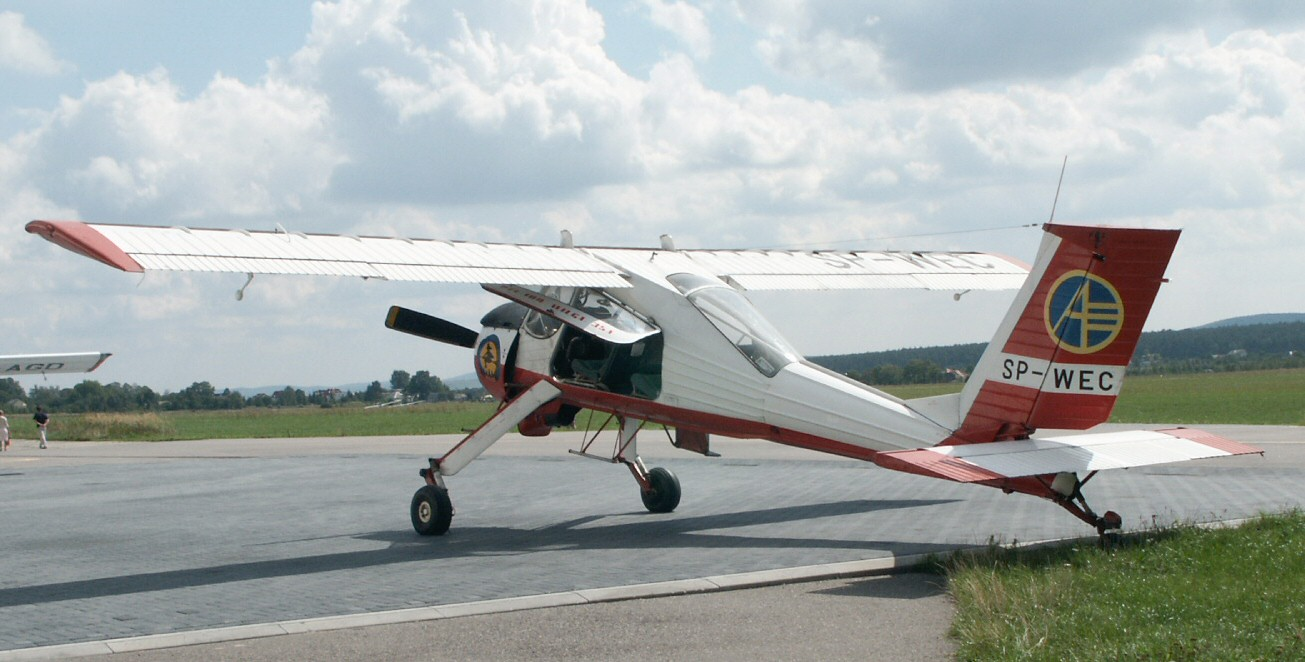 PZL-104 Wilga 35 (SP-WEC) of Aeroklub Kielecki at Kielce-Masłów Airport